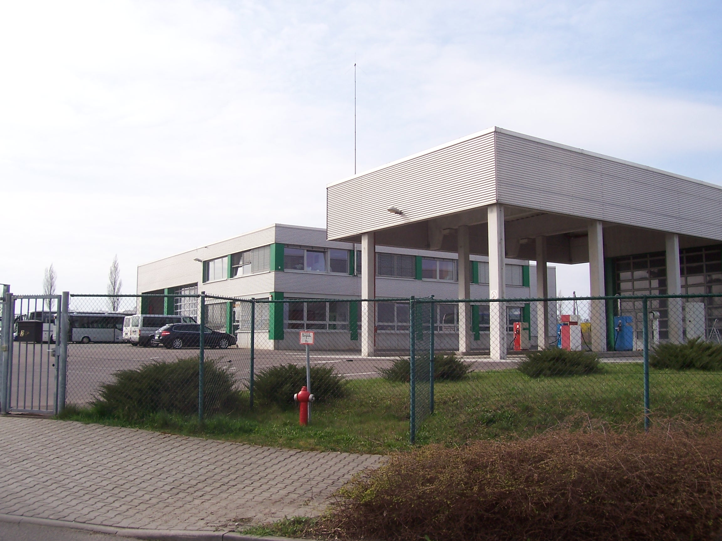 Betriebshof von SaxBus Eilenburger Busverkehr GmbH in Eilenburg im Industriegebiet Am Schanzberg